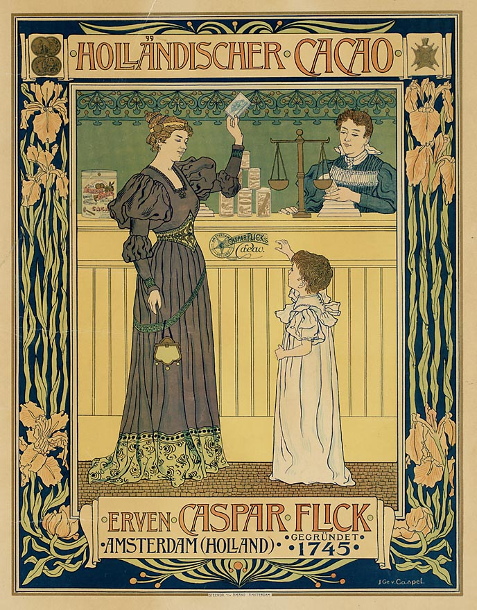 Affiche. "Holländischer Cacao. Erven Caspar Flick. Amsterdam".